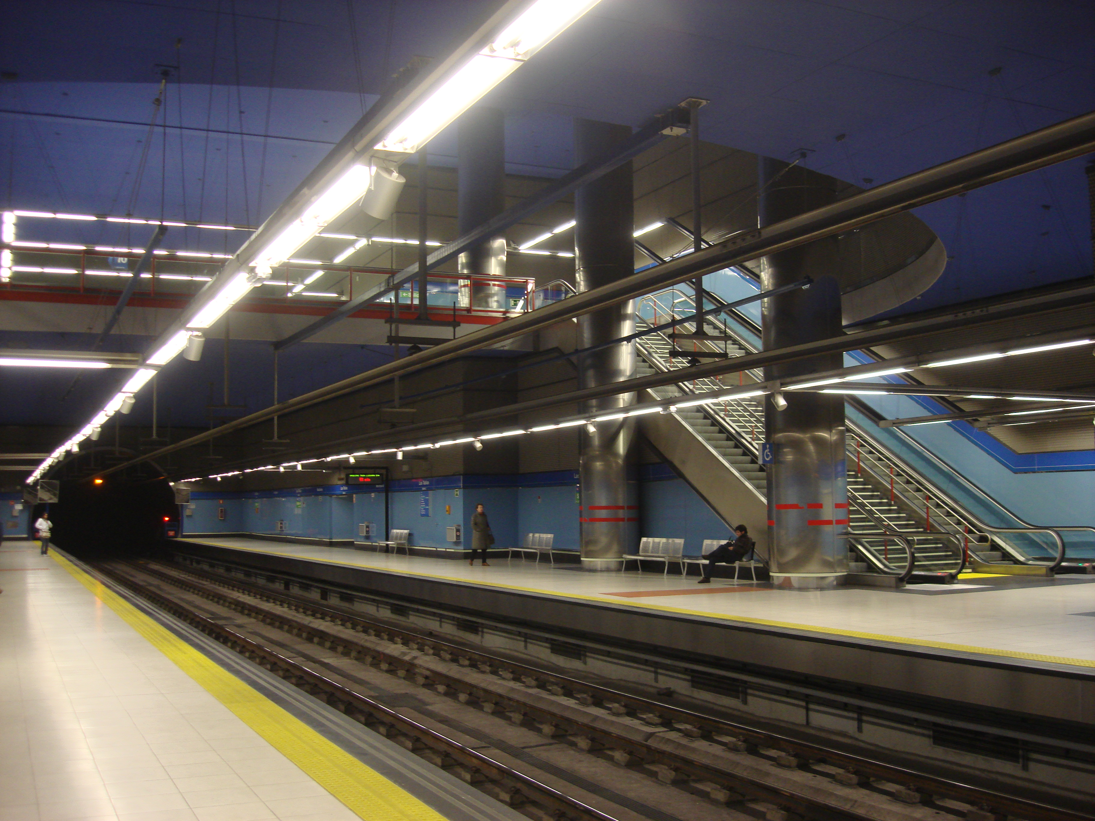 Own work